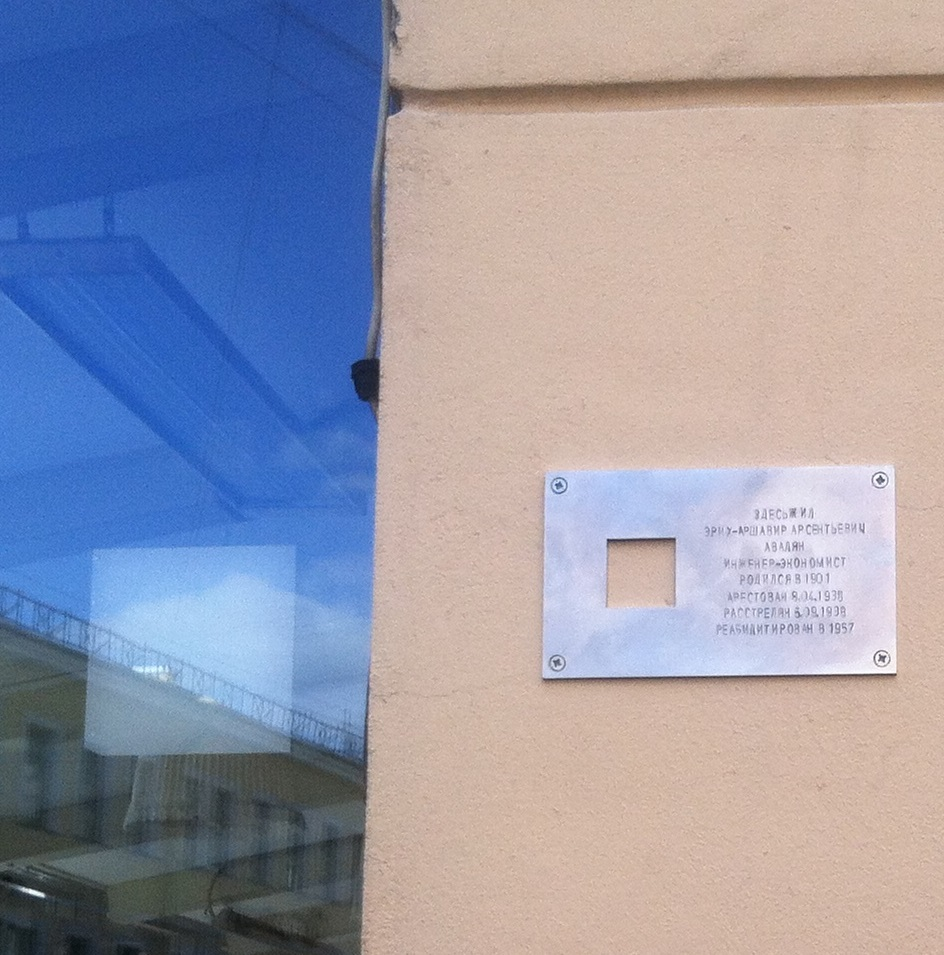 Памятные знаки проекта "Последний адрес" по адресу Петербург, ул. Рубинштейна 23